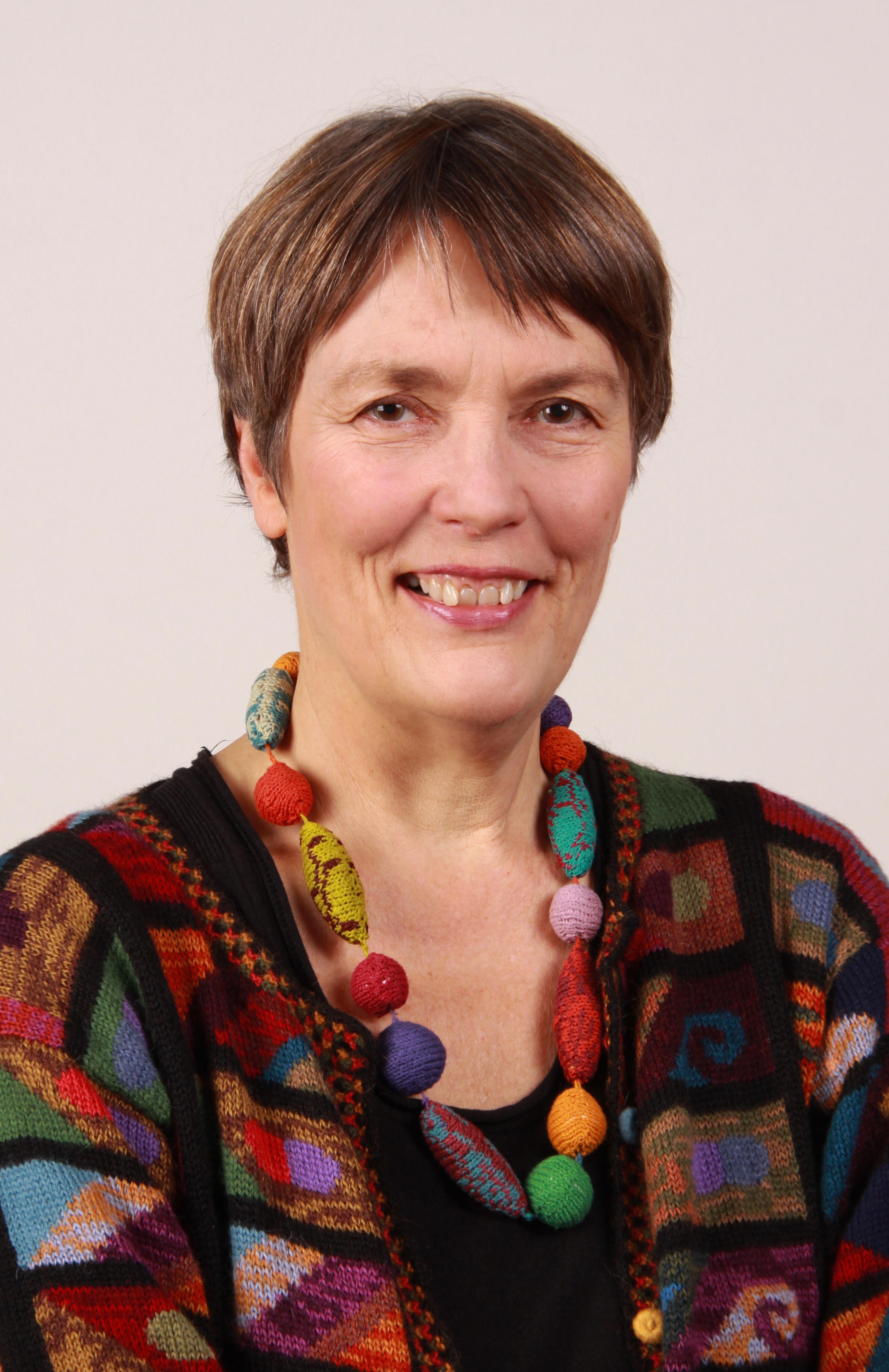 Abgeordnete/r Europaparlament